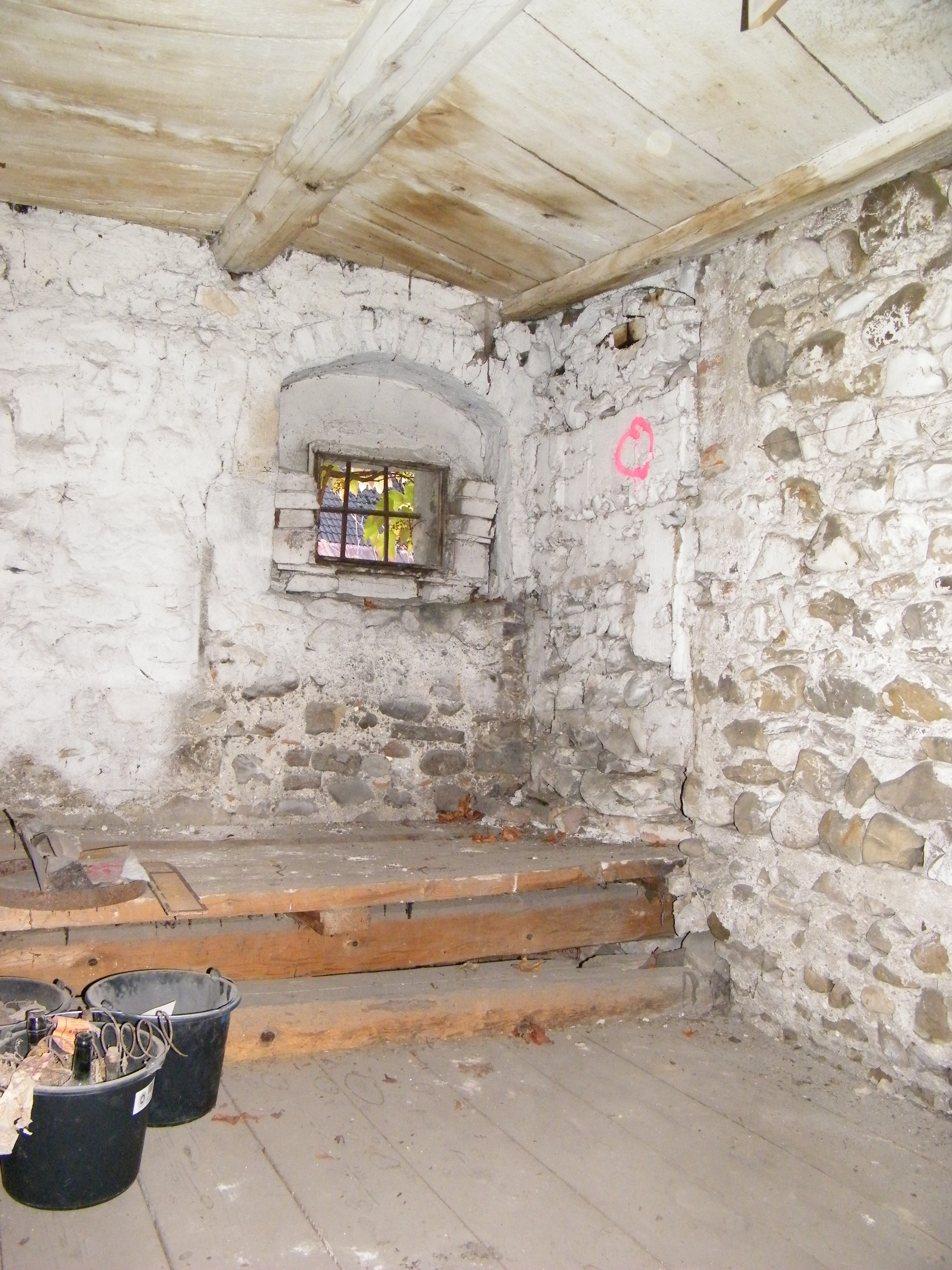 Wehrgang im Nonnenturm Kempten